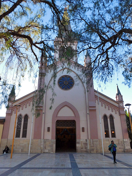 Catedral de San Juan Bautista, Calama, Región de Antofagasta, Chile.